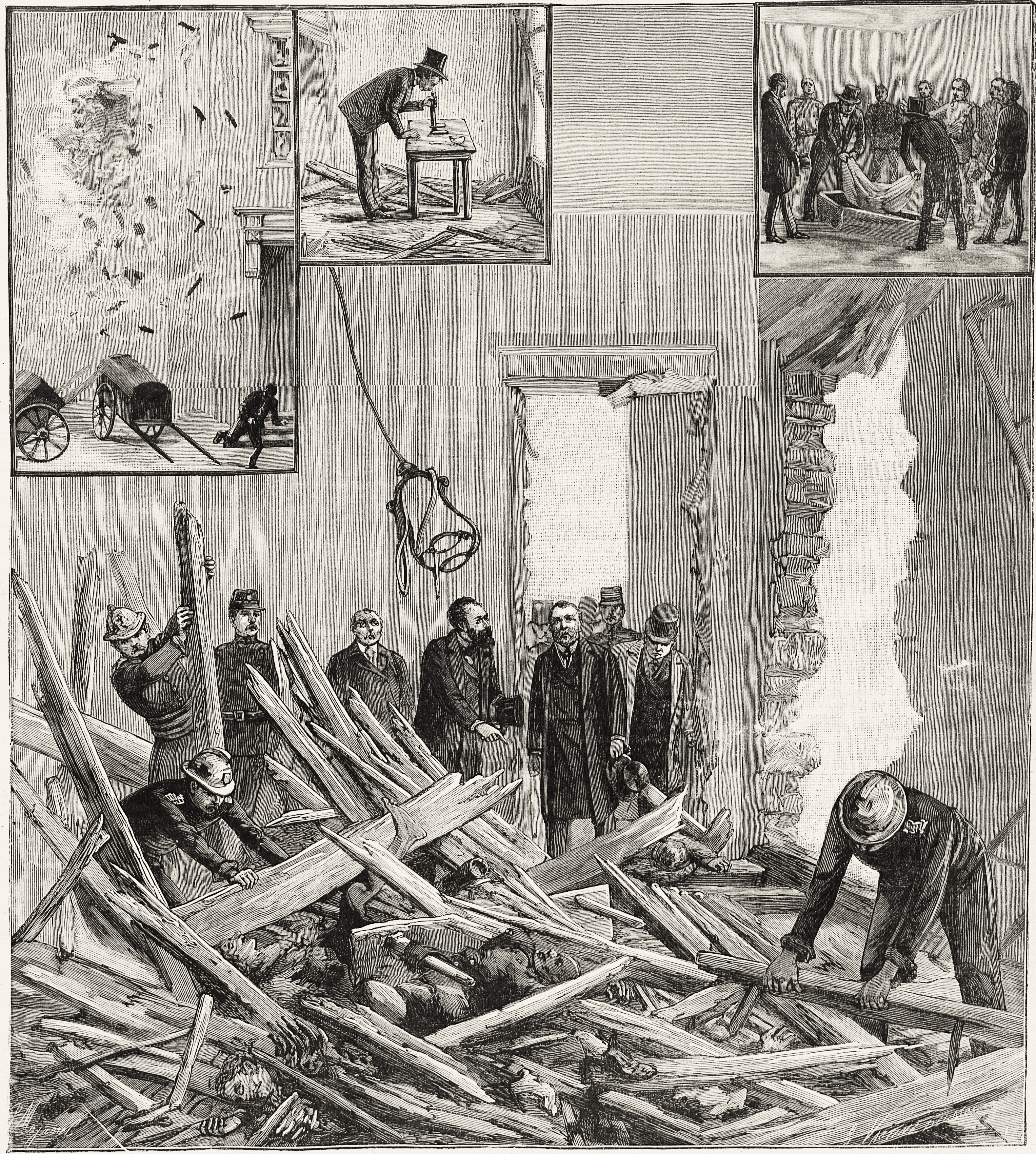 Imagem da capa do jornal Le Progress Ilustré de 1893 sobre o atentado de Émile Henry à rua dos infantes.